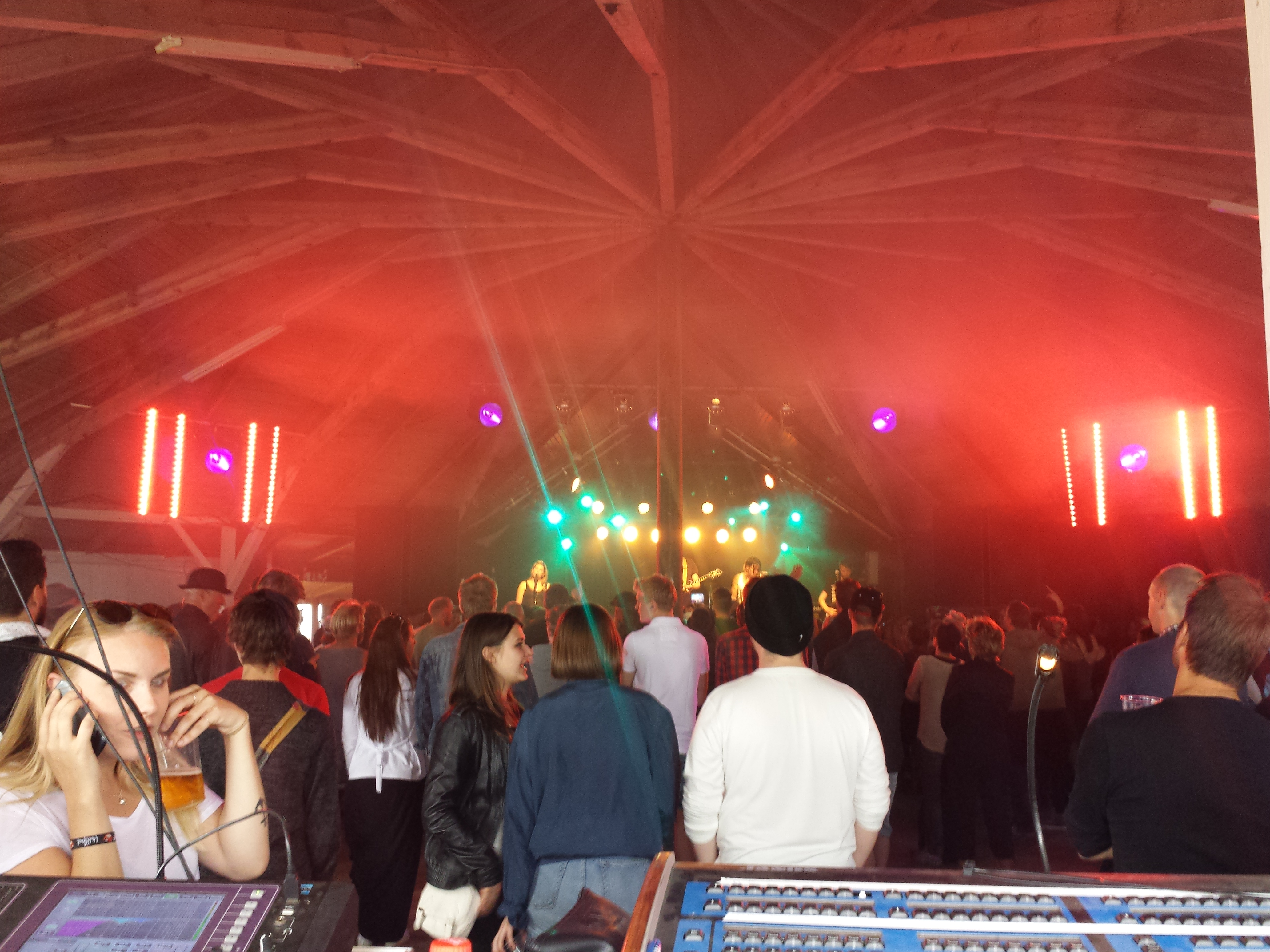 Utsikten från Front Of House på Stora Dans under festivalen This Is Hultsfred 2014.